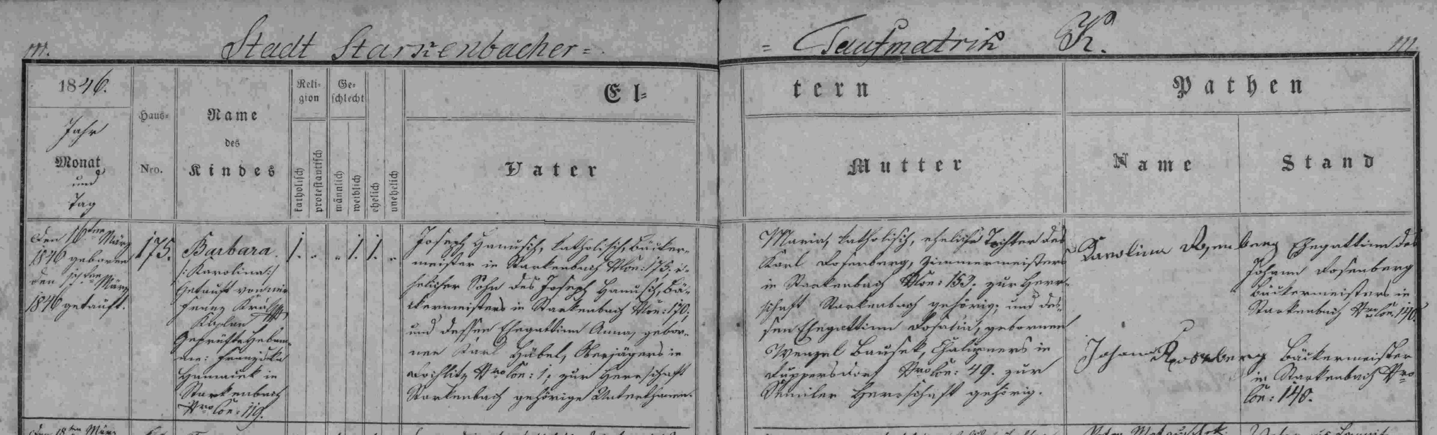 matriční zápis o narození a křtu Barbory Hanušové (matrika N 1841-1852 Jilemnice (SOA Zámrsk))